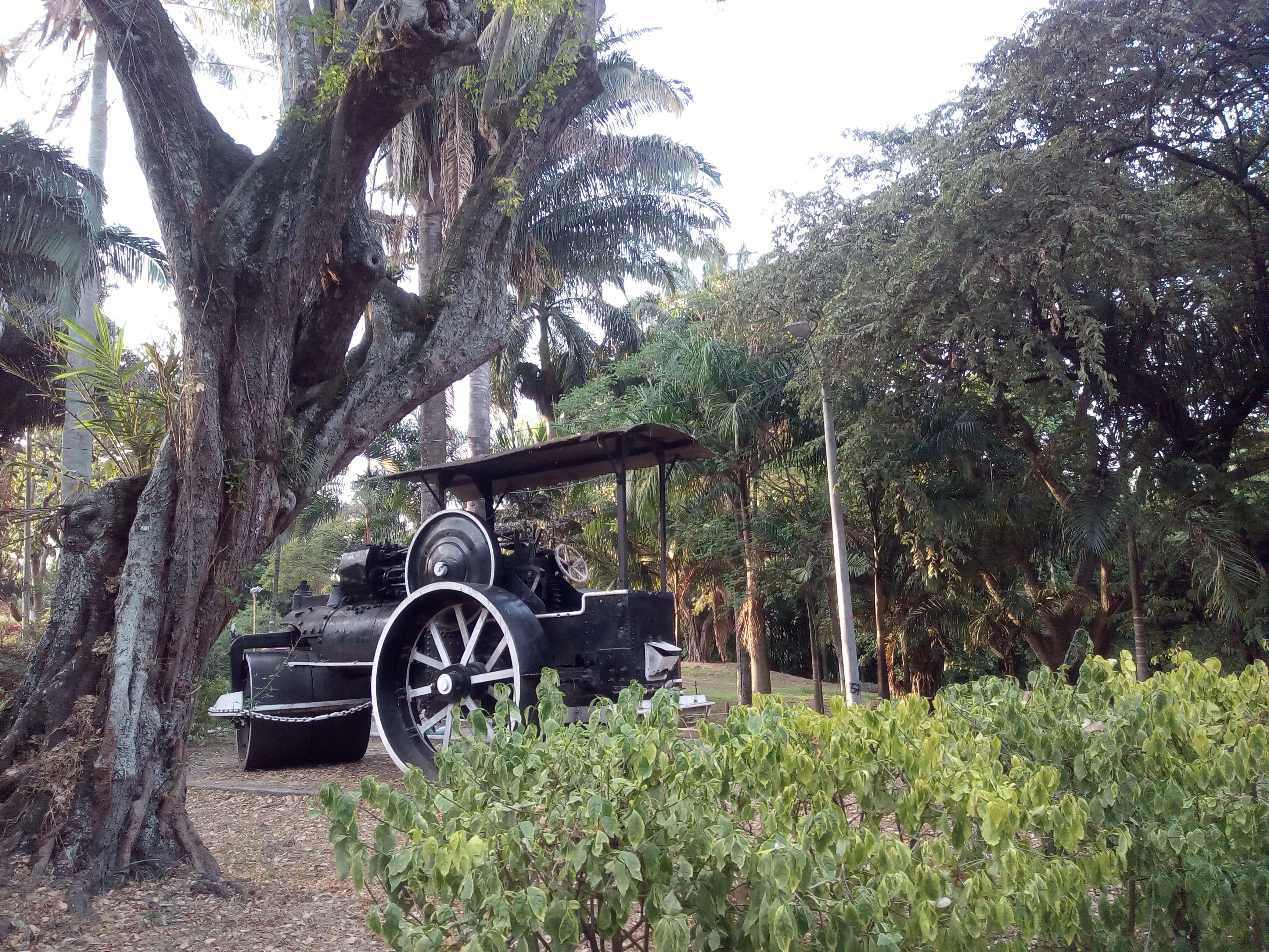 Tomada en el Bosque Municipal de Palmira.